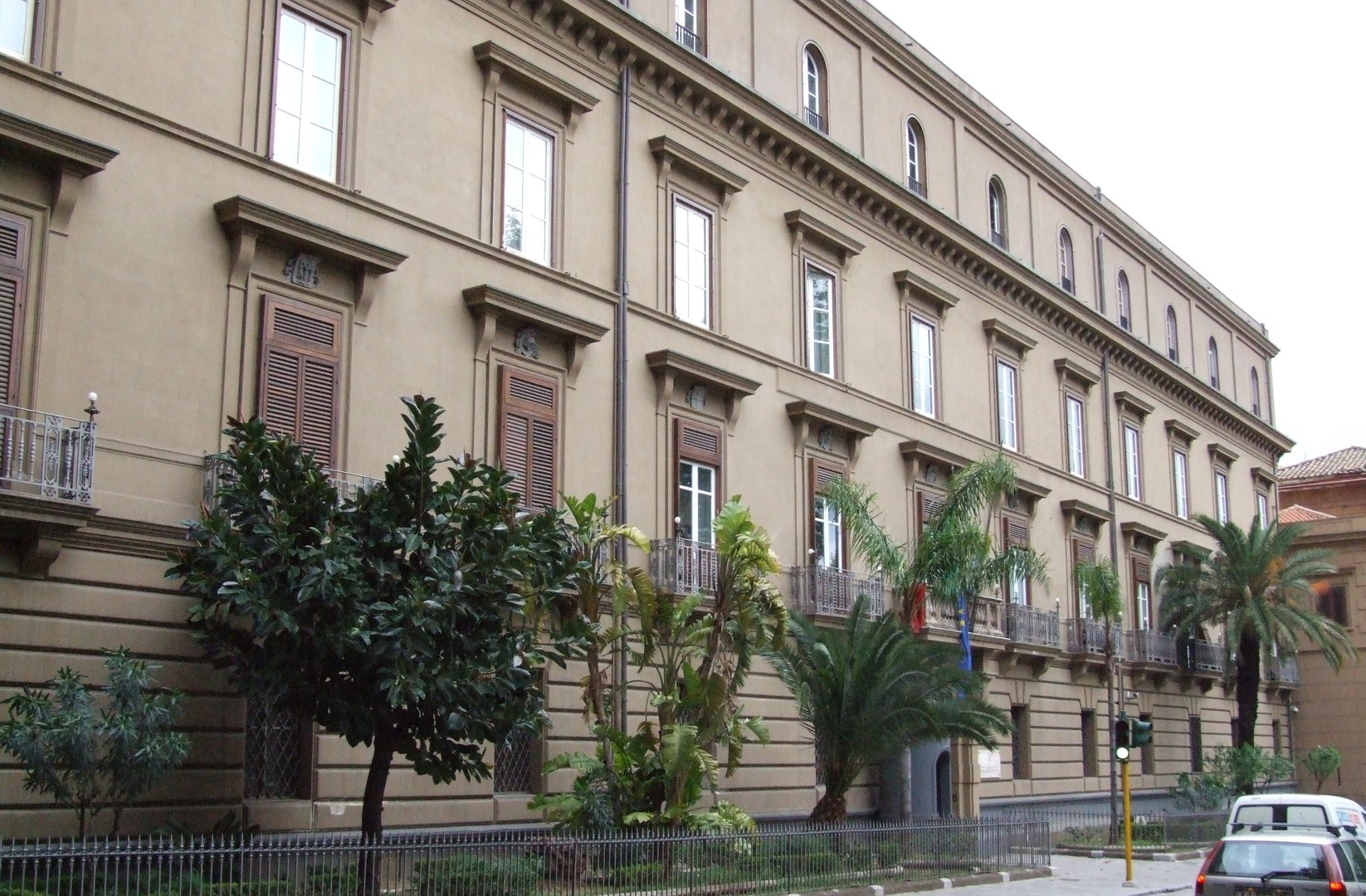 facciata principale Caserma "Dalla Chiesa", comando Legione Carabinieri, Palermo